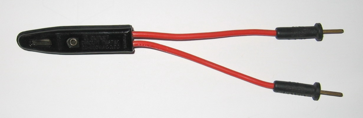 neon test lamp ("neon tester", "electrical tester")